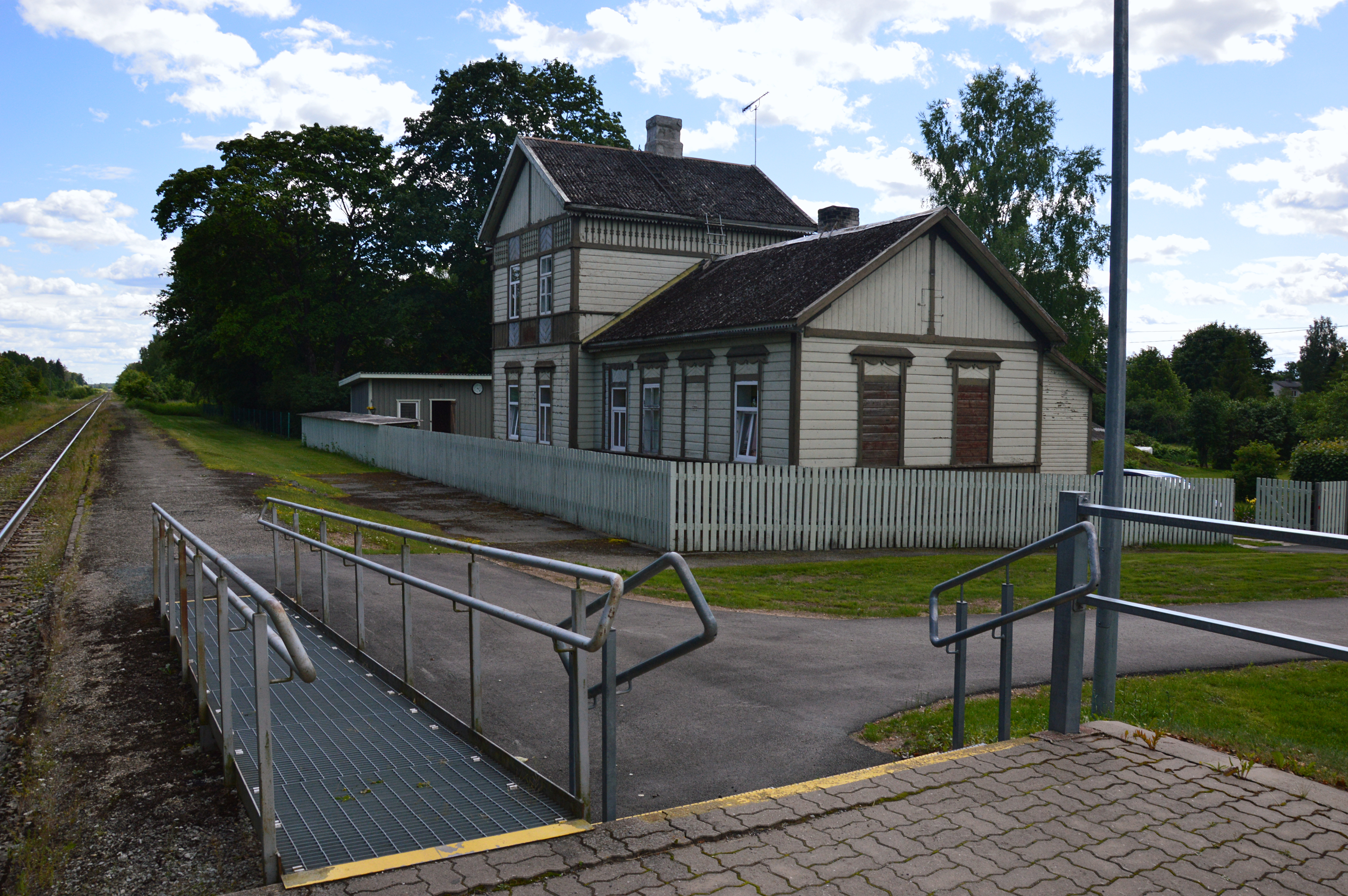 Keava vana jaamahoone